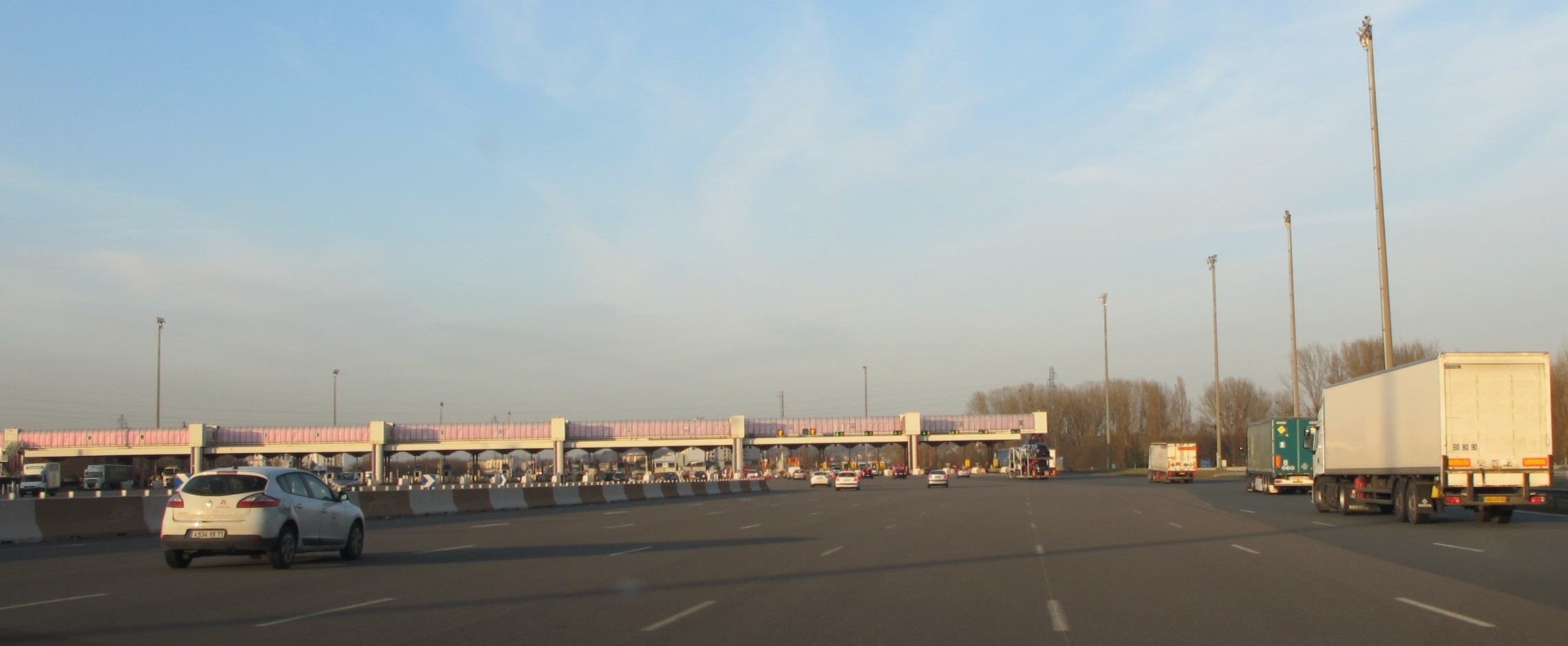 Autoroute A6 - France